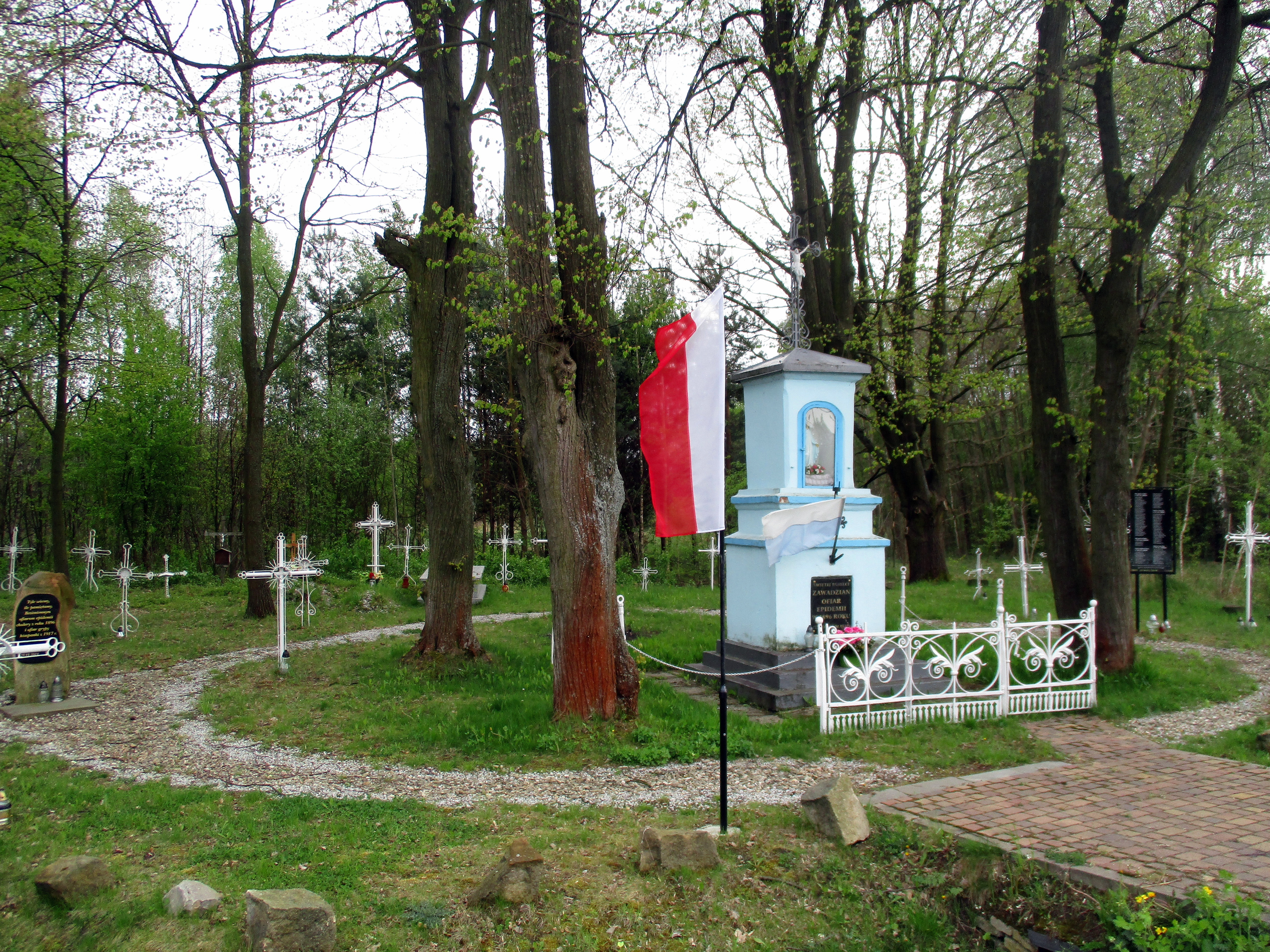 Cmentarz mieszkańców wsi Zawada i Śliwaków zmarłych podczas epidemii cholery w 1852, 1866 i 1896, podczas epidemii czarnej ospy w 1873 oraz podczas epidemii grypy hiszpanki w 1917, ul. Częstochowska w Zawadzie.